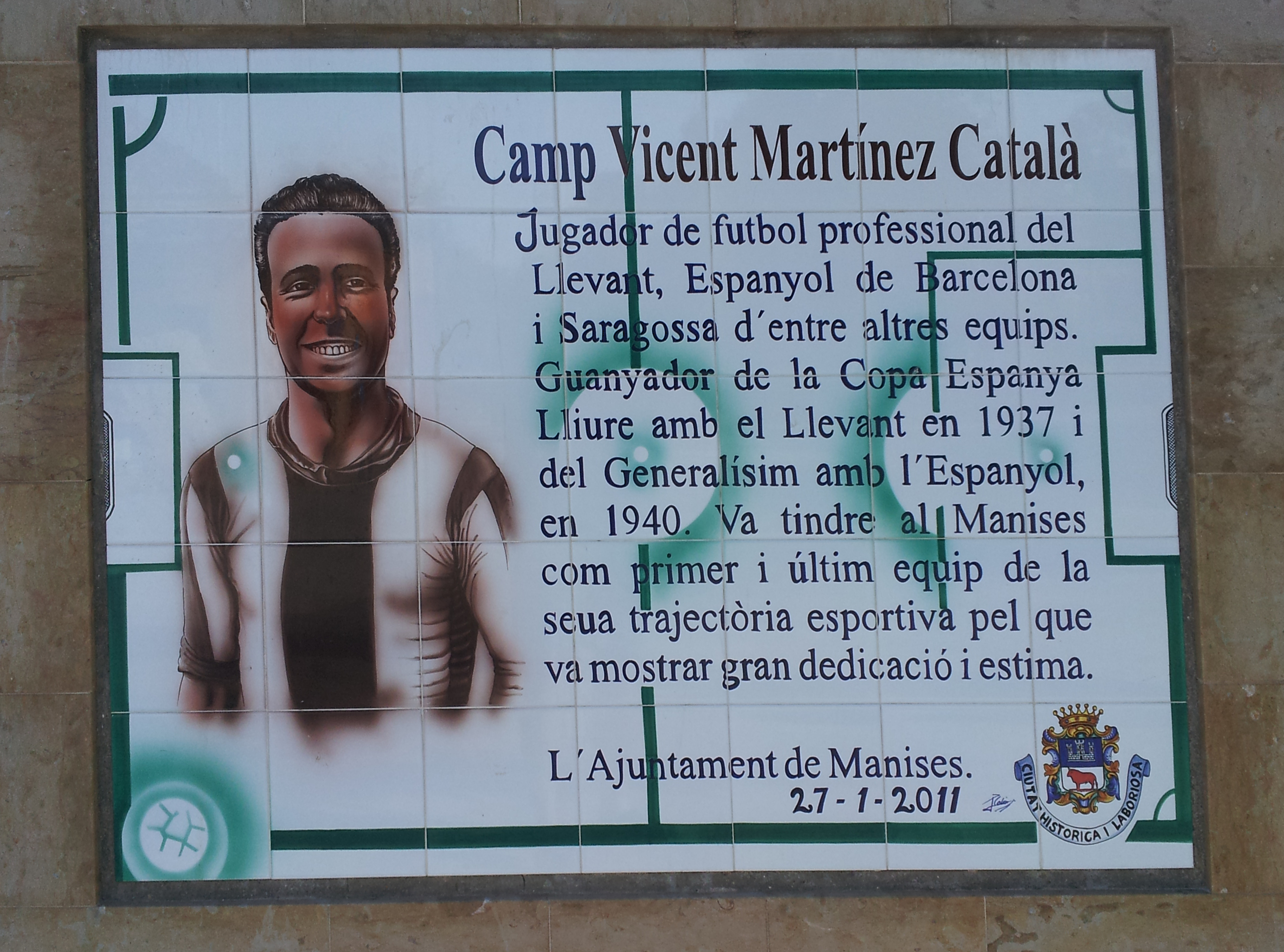 Placa commemorativa dedicada a Vicent Martínez Català.